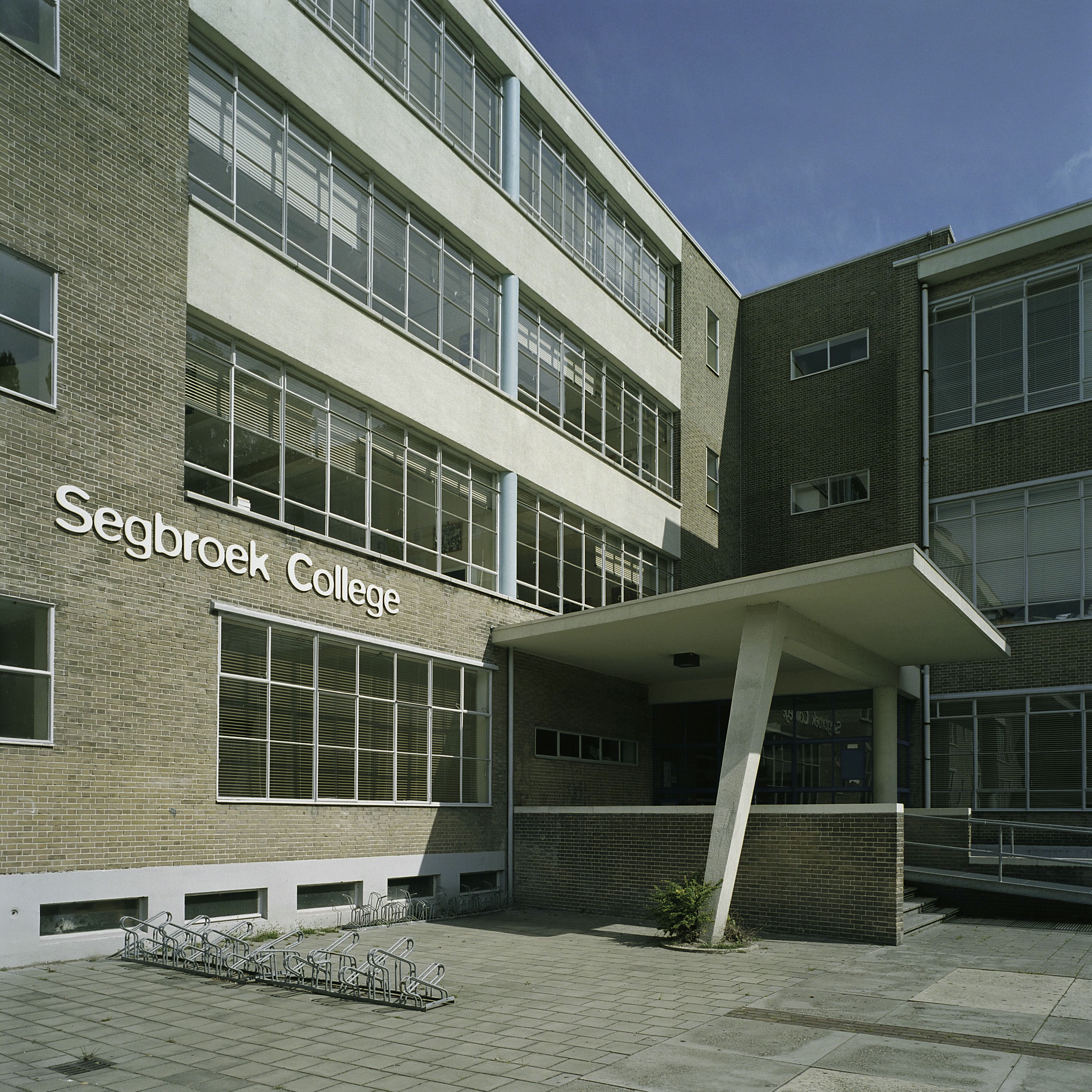 Tweede Vrijzinnig Christelijk Lyceum: Overzicht van de voorzijde met ingangspartij (opmerking: Gefotografeerd voor Monumenten van Herrezen Nederland, bladzijde 103)